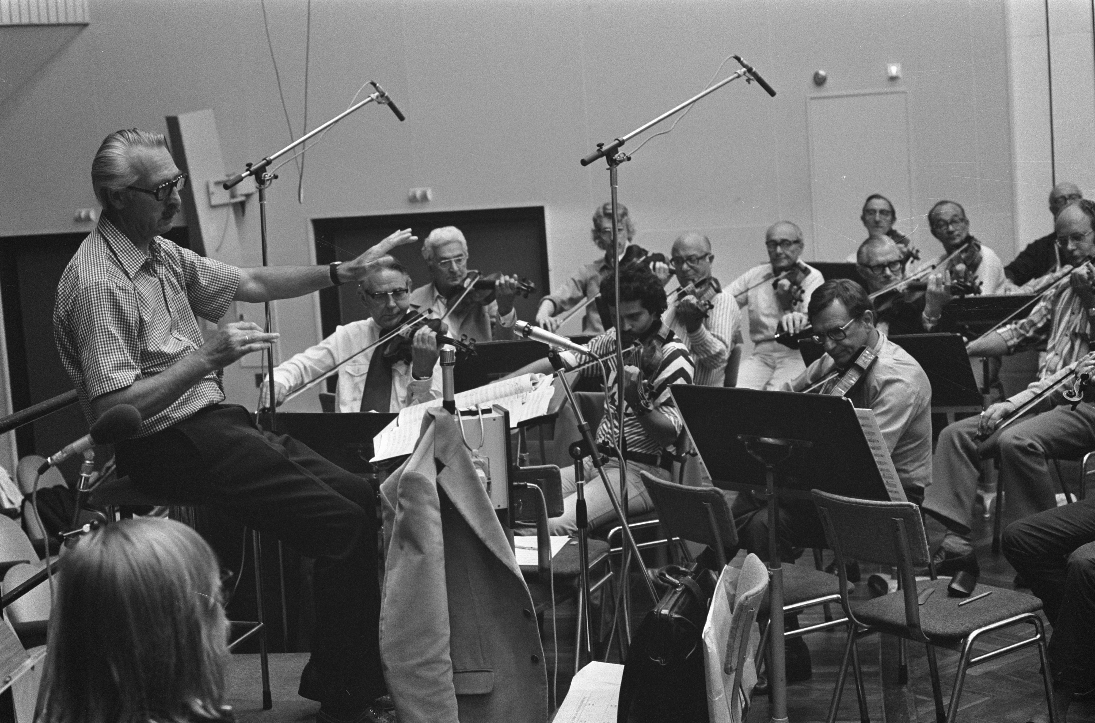 Repetities Nederlandse ploeg voor Nordring Radio Prize dirigent Dolf van der Linden. Datum 6 augustus 1973